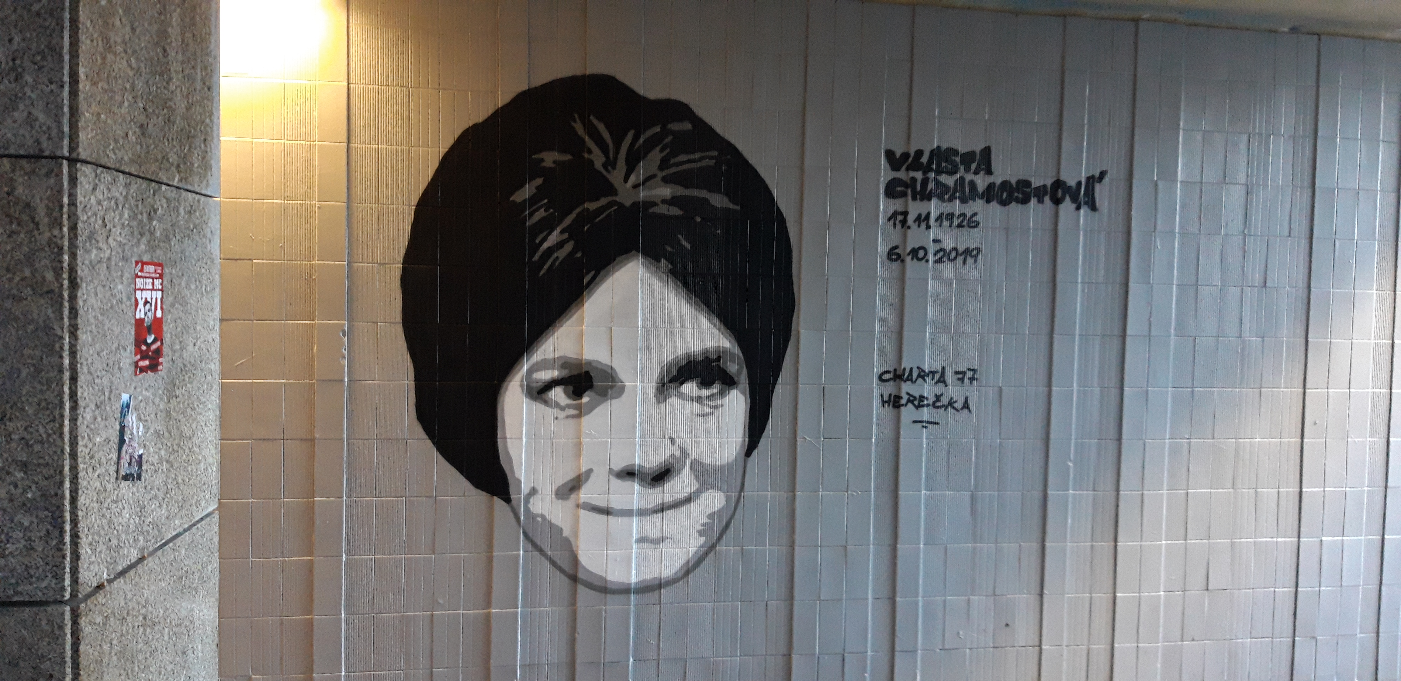 Vlasta Chramostová, graffiti na památku zemřelé herečky v podchodu zastávky tramvají Muzeum (v Legerově ulici) v Praze.